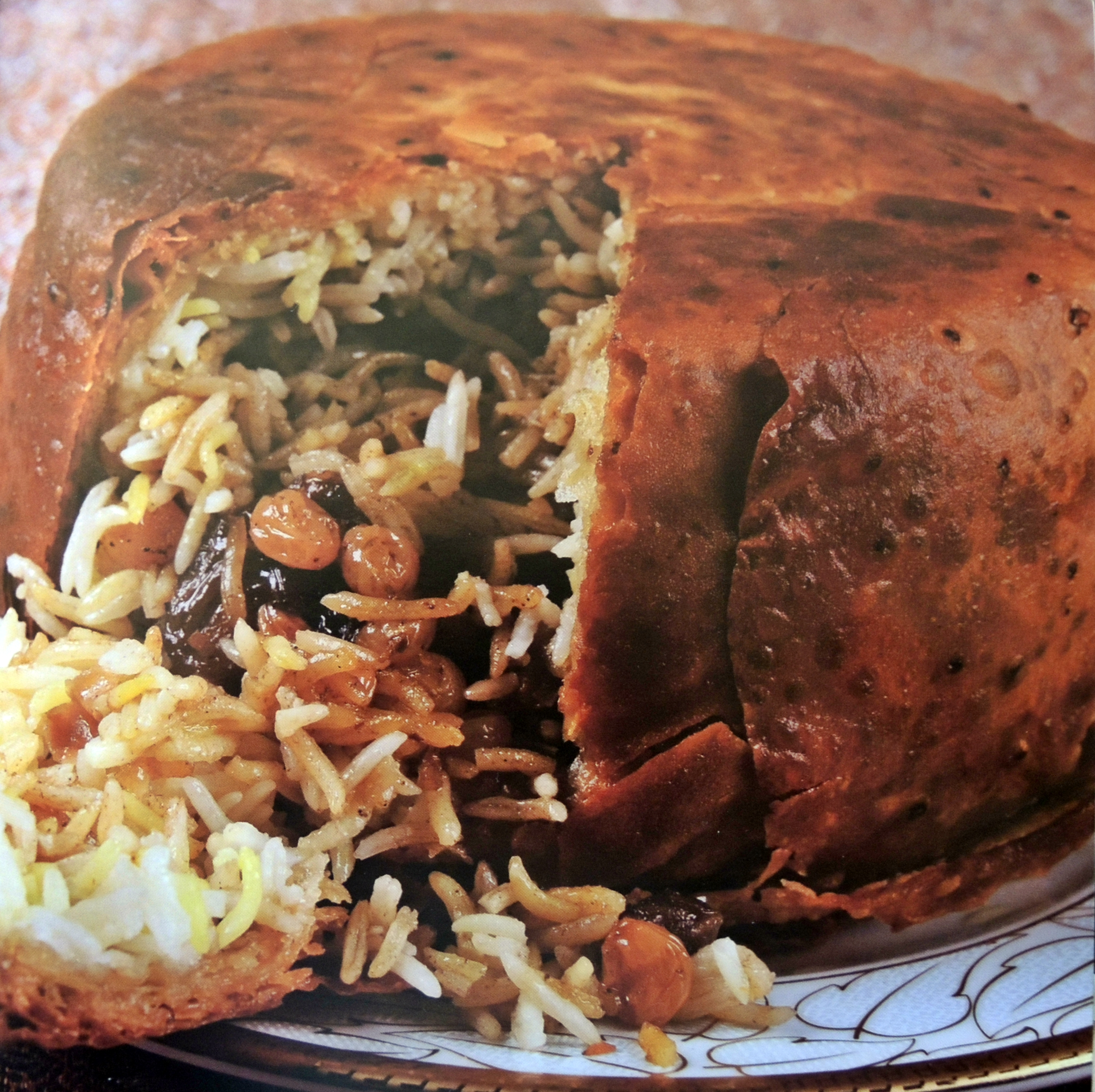 Şah plovu, Azərbaycan mətbəxi